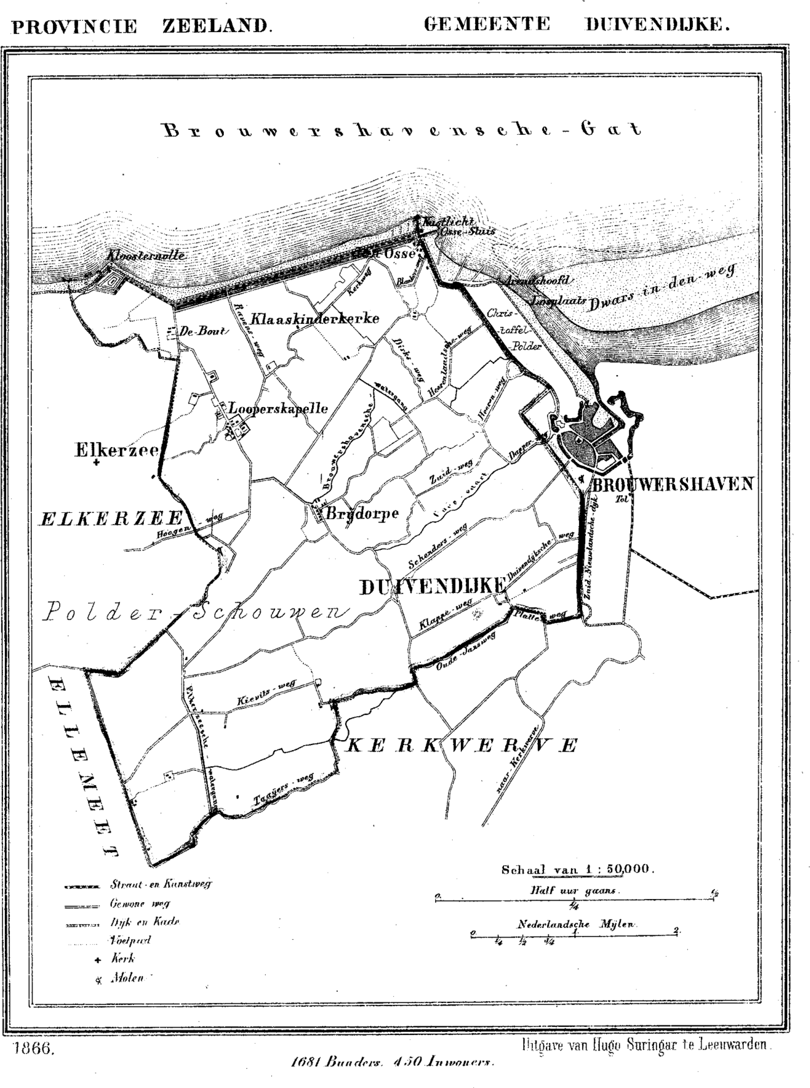 Gemeente Duivendijke, Zeeland, Nederland